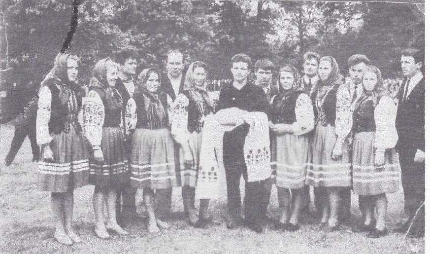 Перший виступ хор-ланки. 1964рік, урочище "Дуби", село Миляч.